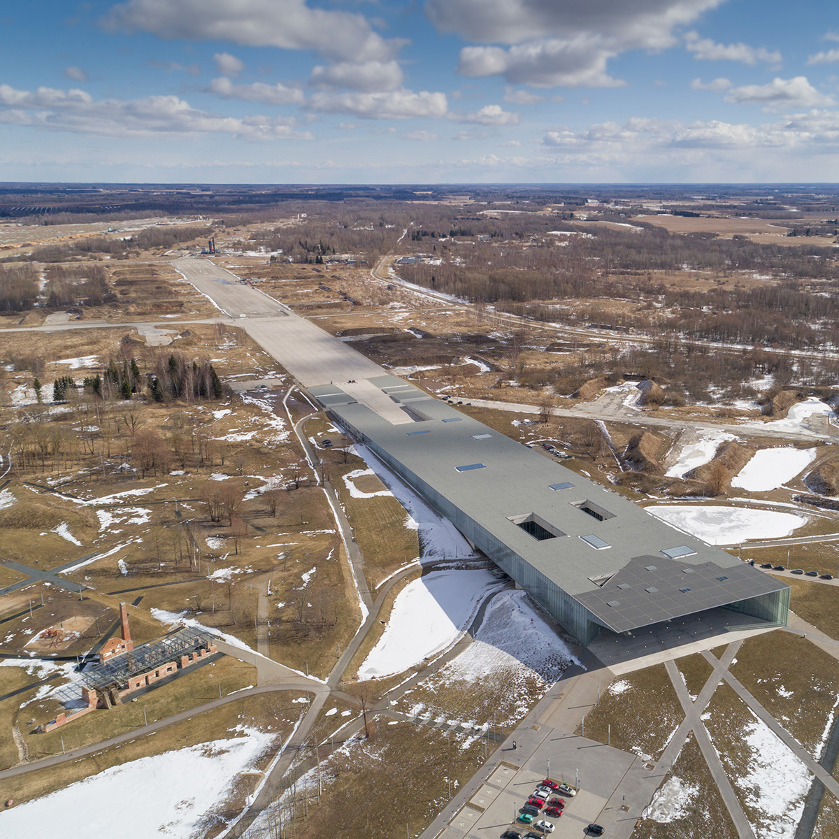 Eesti Rahva Muuseumi peahoone